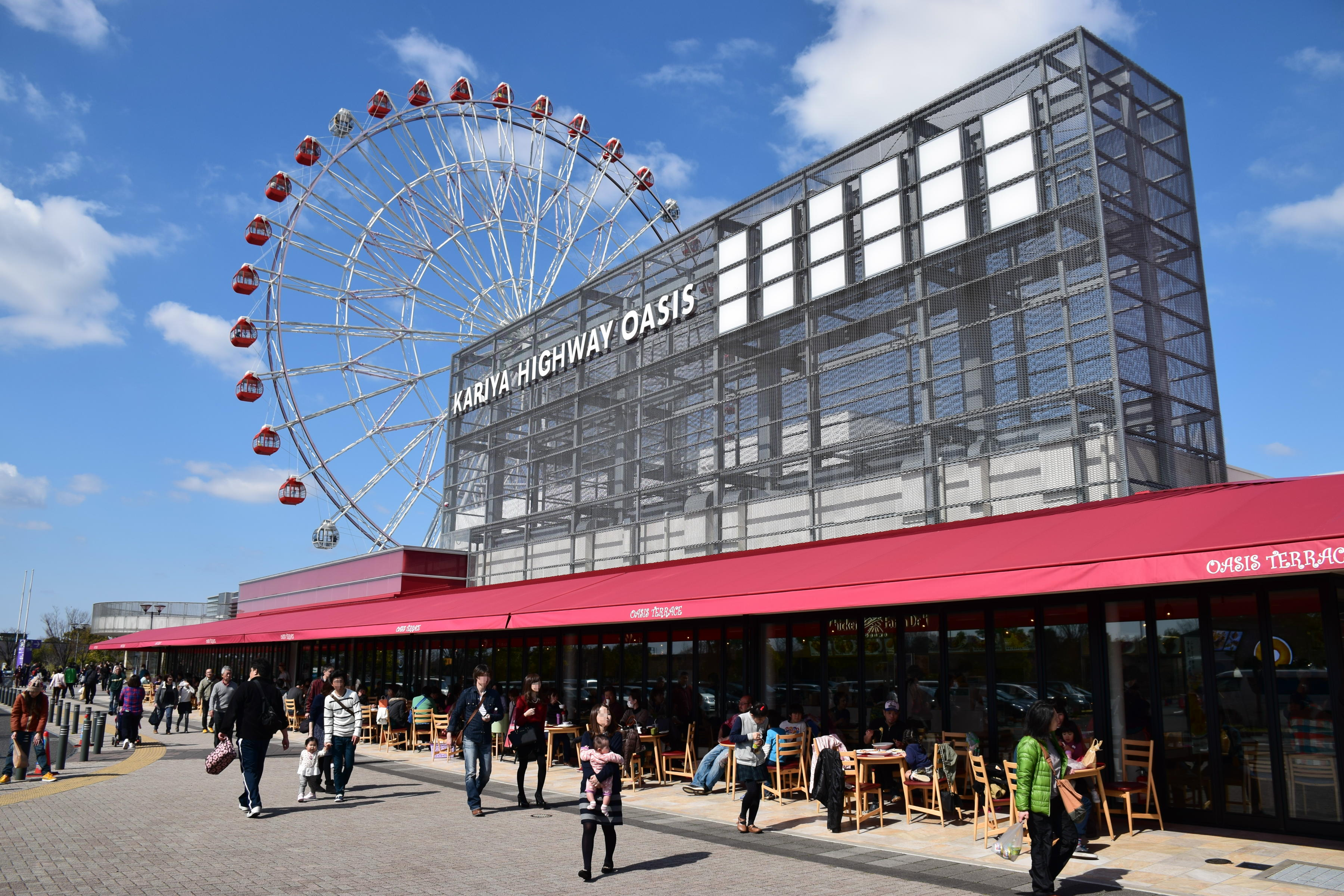 刈谷ハイウェイオアシス